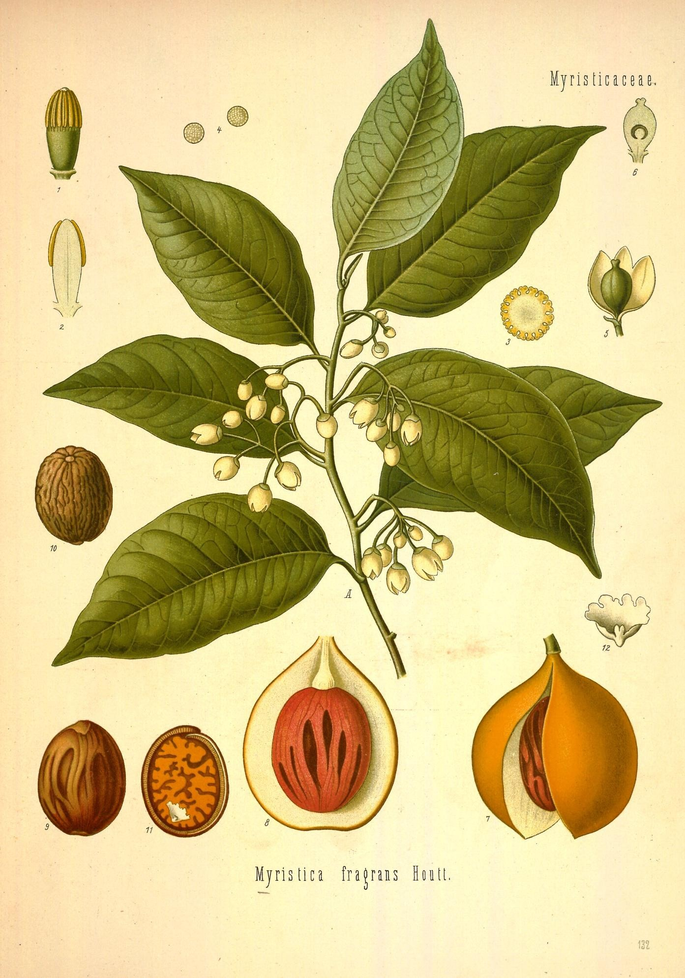 Muskatnussbaum. A blühender Zweig mit männlichen Blüthen, nat. Grösse; 1 Staubgefässsäule mit Staubgefässen, vergrössert (stimmt mit der Zeichnung in Hayne, jedoch nicht mit Bâillon in der Beschreibung überein); 2 dieselbe im Längsschnitt, desgl.; 3 dieselbe im Querschnitt, desgl.; 4 Pollen, desgl.; 5 weibliche Blüthe, desgl.; 6 Stempel im Längsschnitt, desgl.; 7 Frucht mit der aufgesprungenen fleischigen Hülle, natürl. Grösse; 8 dieselbe mit halbirter Hülle, desgl.; 9 Nuss mit Arillus, desgl.; 10 dieselbe ohne Arillus, desgl.; 11 Nuss im Längsschnitt, desgl.; 12 Embryo, vergrössert.